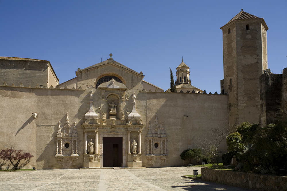 unidentified Spain